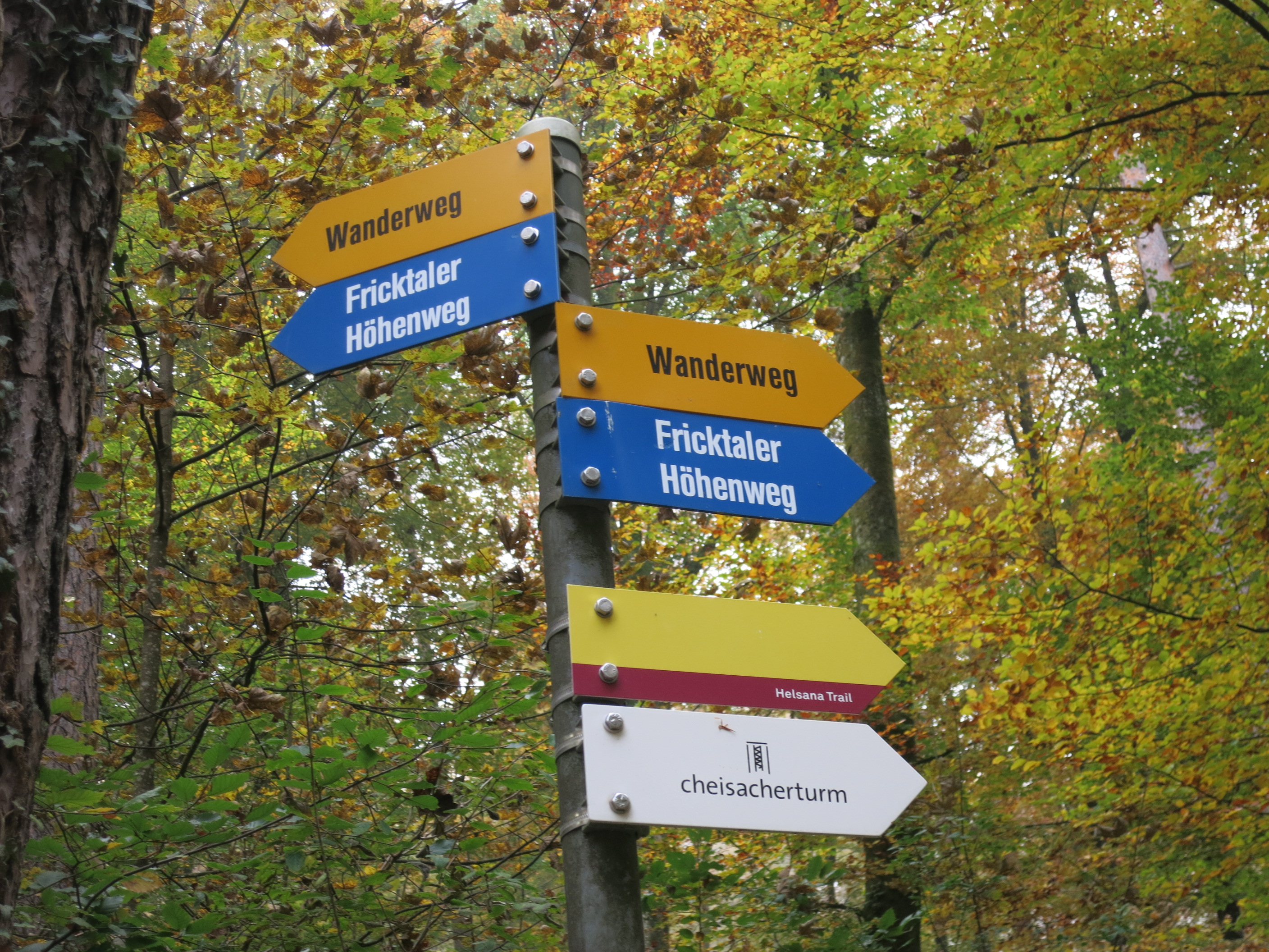 Fricktaler Höhenweg AG, Schweiz